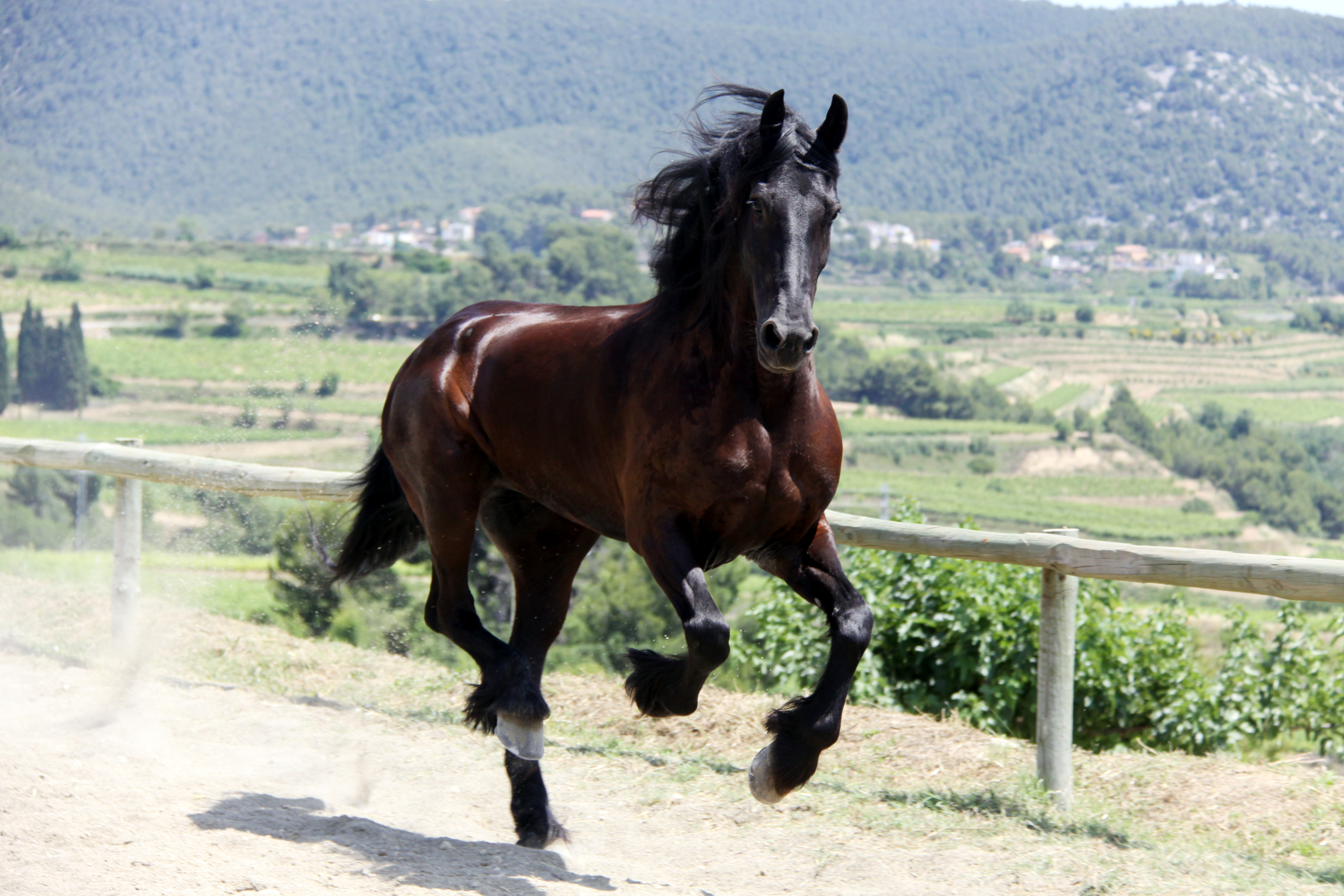 Estones de galop a l'aire lliure... Sant Pau d'Ordal, 24 de Juny de 2010